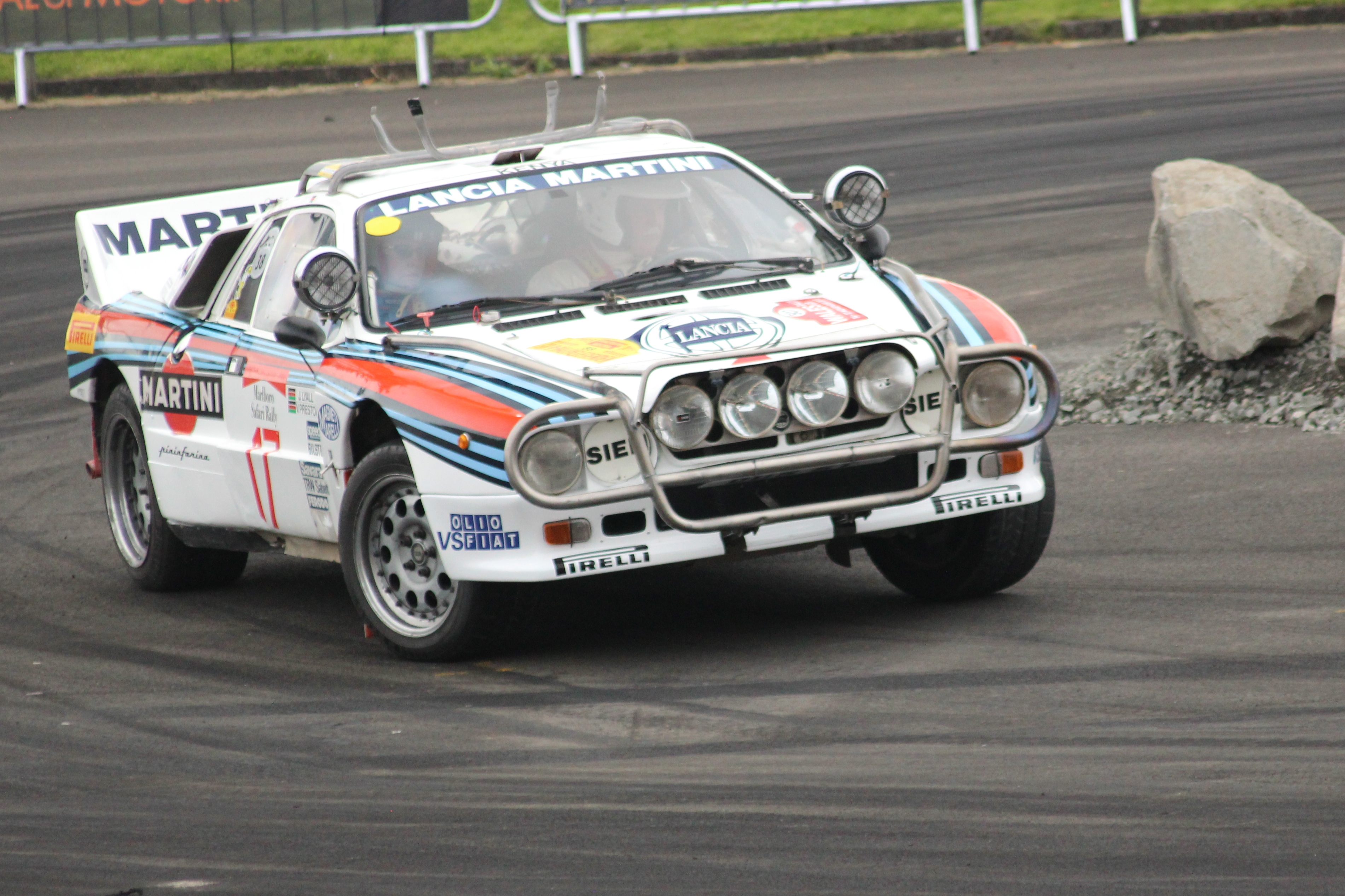 Ignition Festival Glasgow